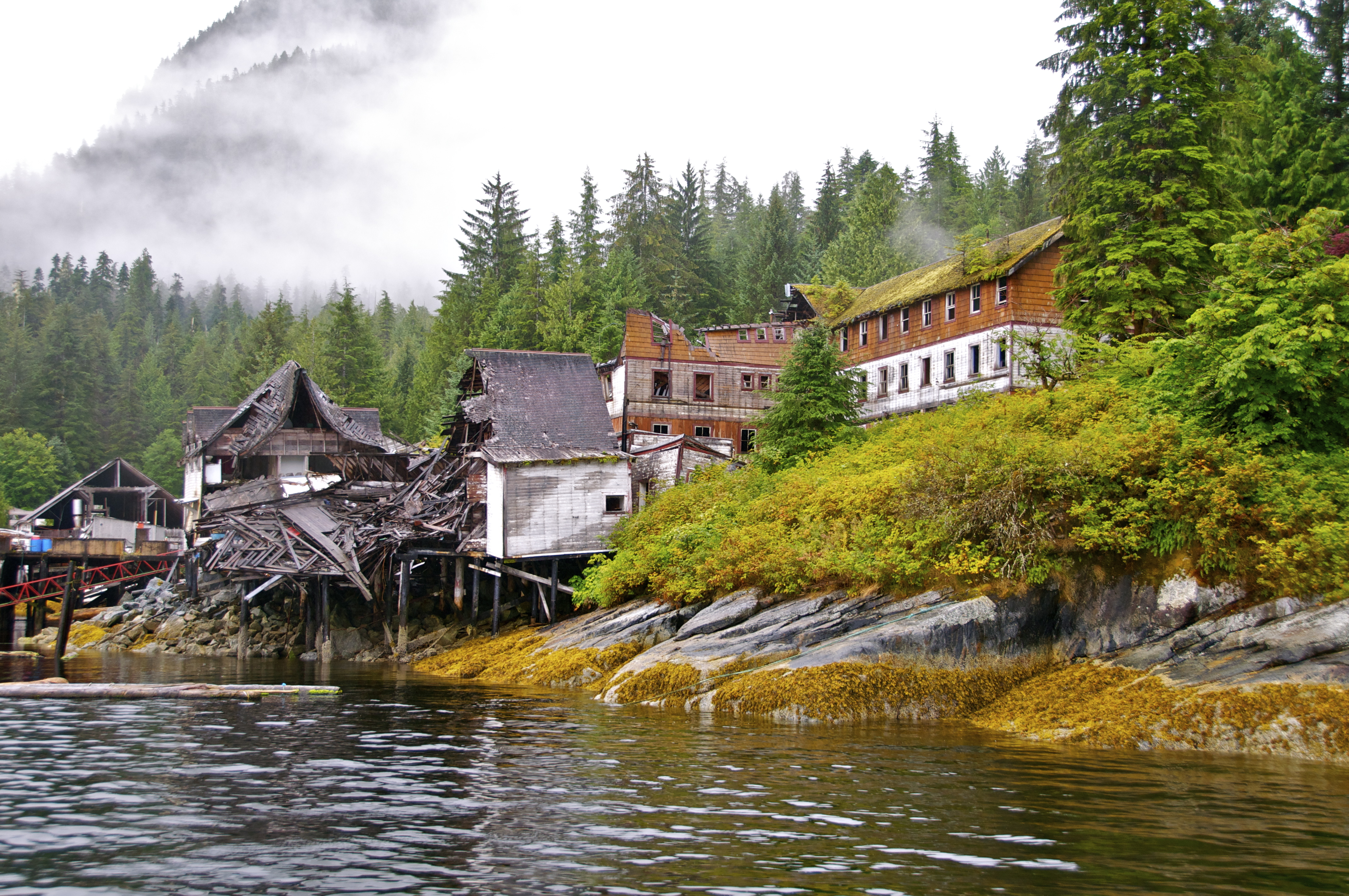 Day 4 - Butedale